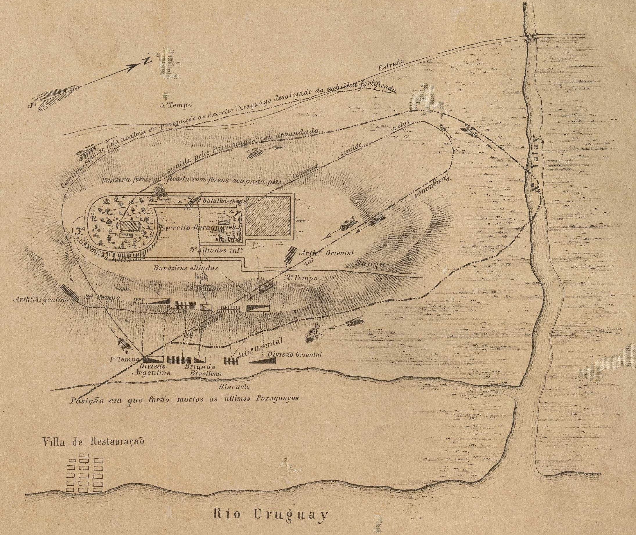 Batalha do Yatay [Cartográfico] : a 17 de agosto de 1865 dada na planura do Yatay.